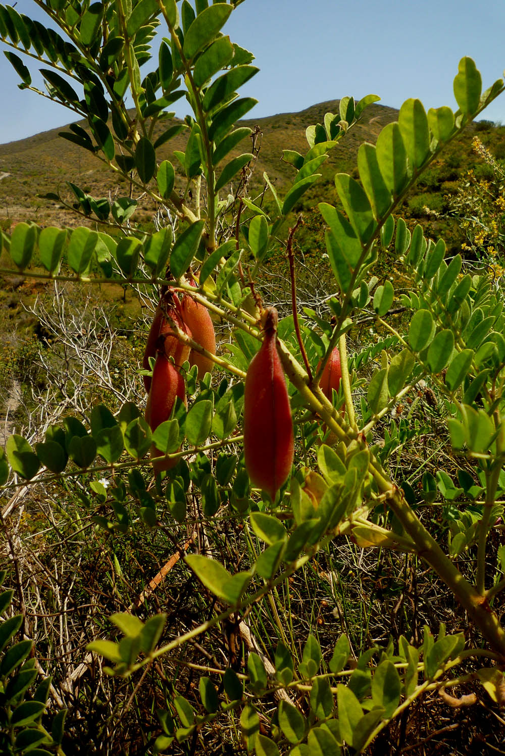 Erophaca baetica en la rambla de El Cañar, Cartagena, España.